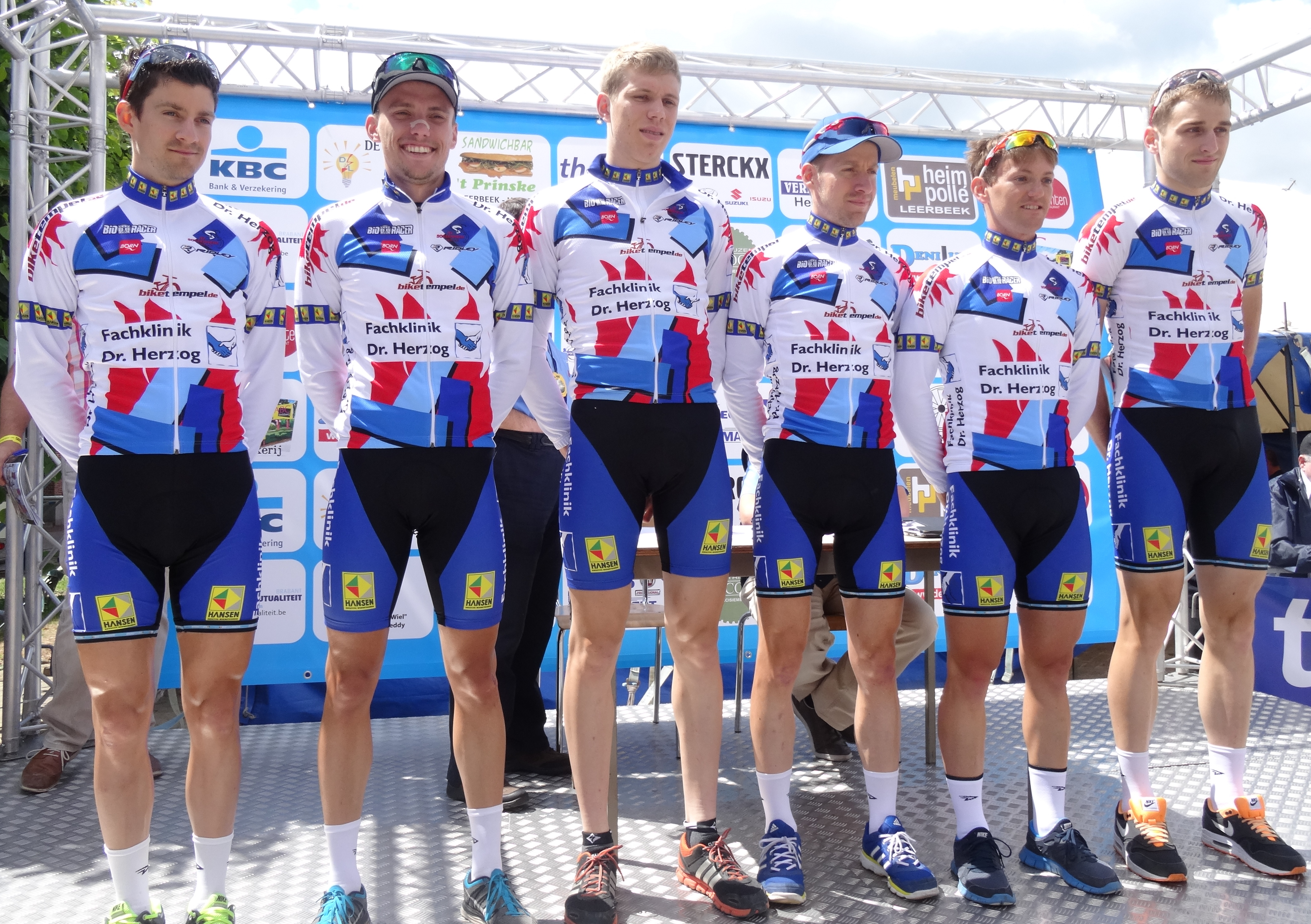 Reportage photographique réalisé le mercredi 25 juin à l'occasion du départ et de l'arrivée de l'Internationale Wielertrofee Jong Maar Moedig 2014 à Oetingen (Gooik), Belgique.